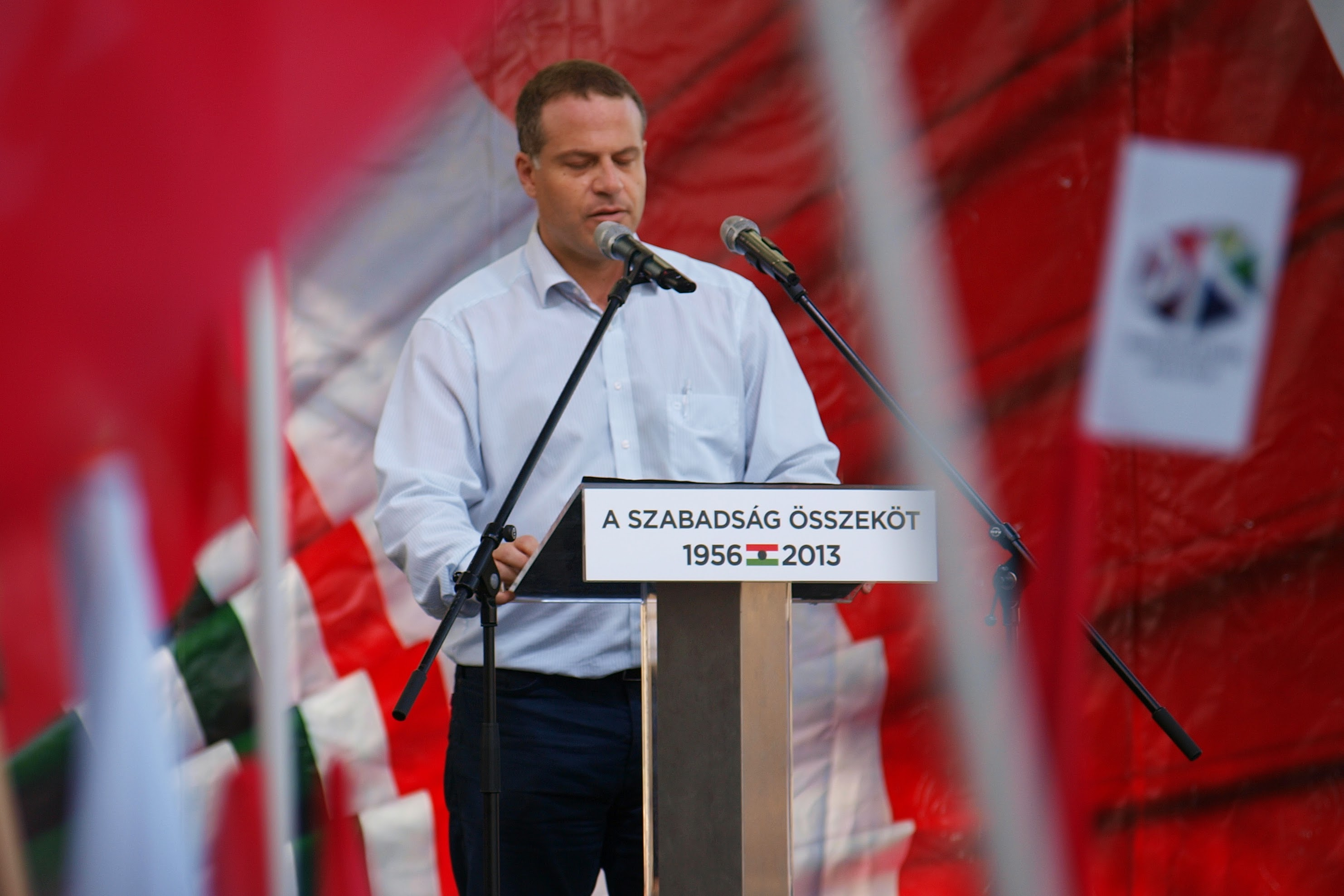 Juhász Péter (Milla) az ellenzéki pártok 2013. október 23-i tüntetésén beszédet mond